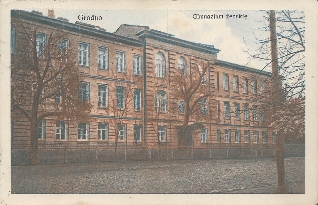 Беларуская (тарашкевіца): Горадня (Horadnia), вуліца Раскоша (vulica Raskoša). Марынская жаночая гімназія